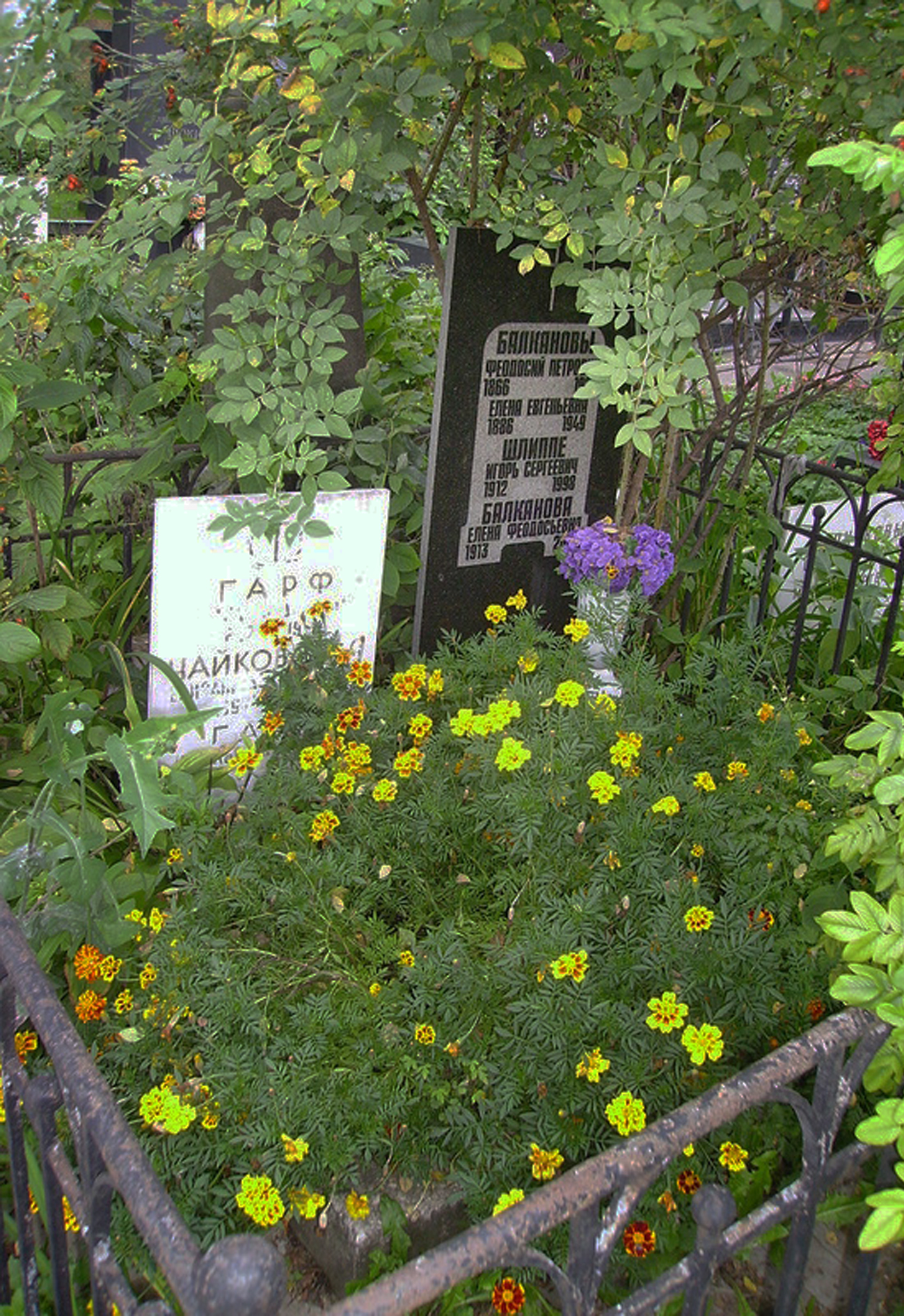 Могила Феодосия Петровича Балканова на Новодевичьем кладбище в Москве.